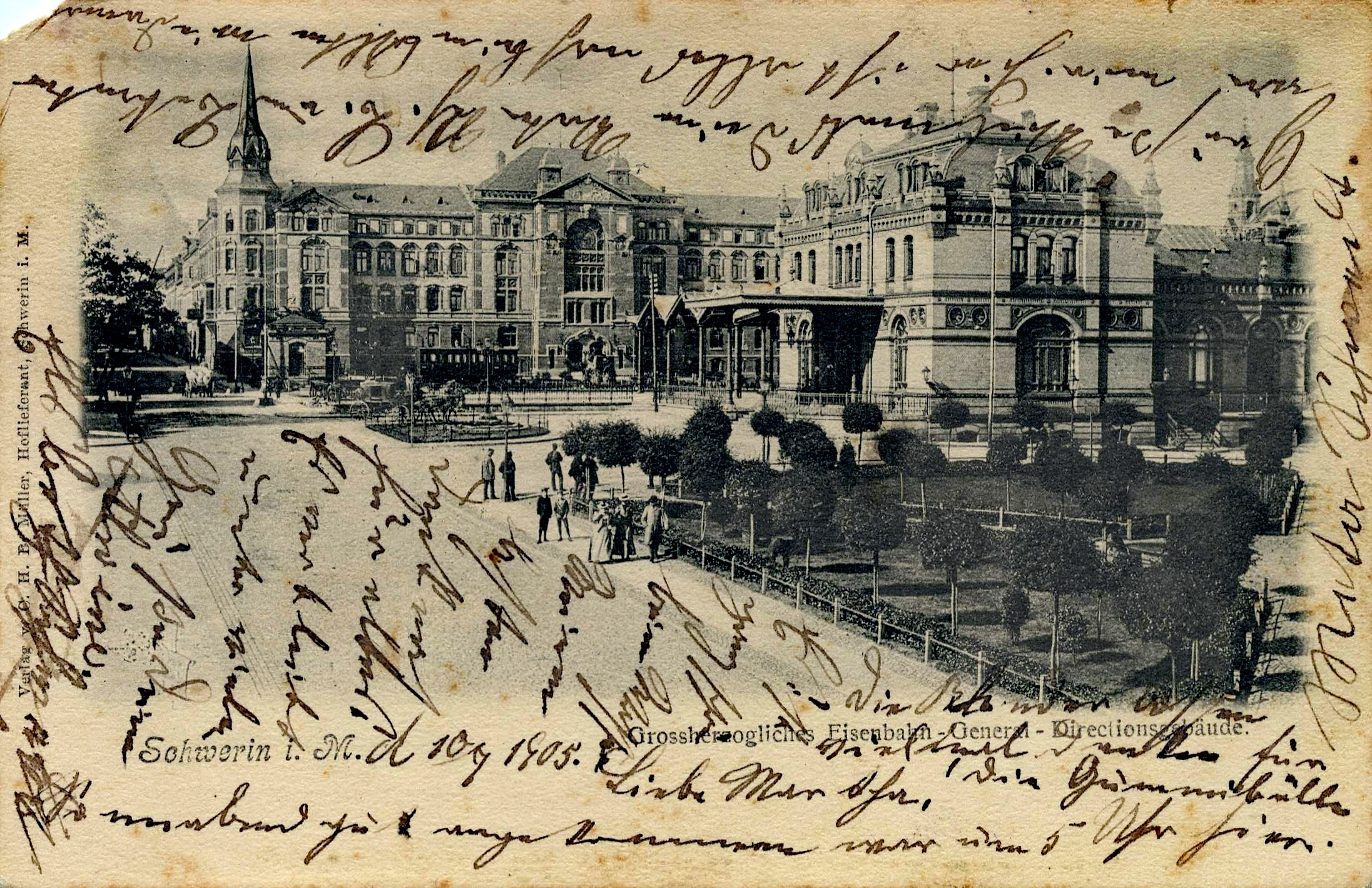 Quergebäude hinten: Gebäude der Großherzoglichen General-Eisenbahn-Direction (GGED). Das war die oberste Verwaltung der staatlichen Großherzoglich Mecklenburgischen Friedrich-Franz-Eisenbahn (M.F.F.E). Rechtes Gebäude: Teil des Schweriner Hauptbahnhofs. Das Foto entstand zwischen 1890 und 1905. Originalbeschriftung: Großherzogliches Eisenbahn-General-Direktionsgebäude